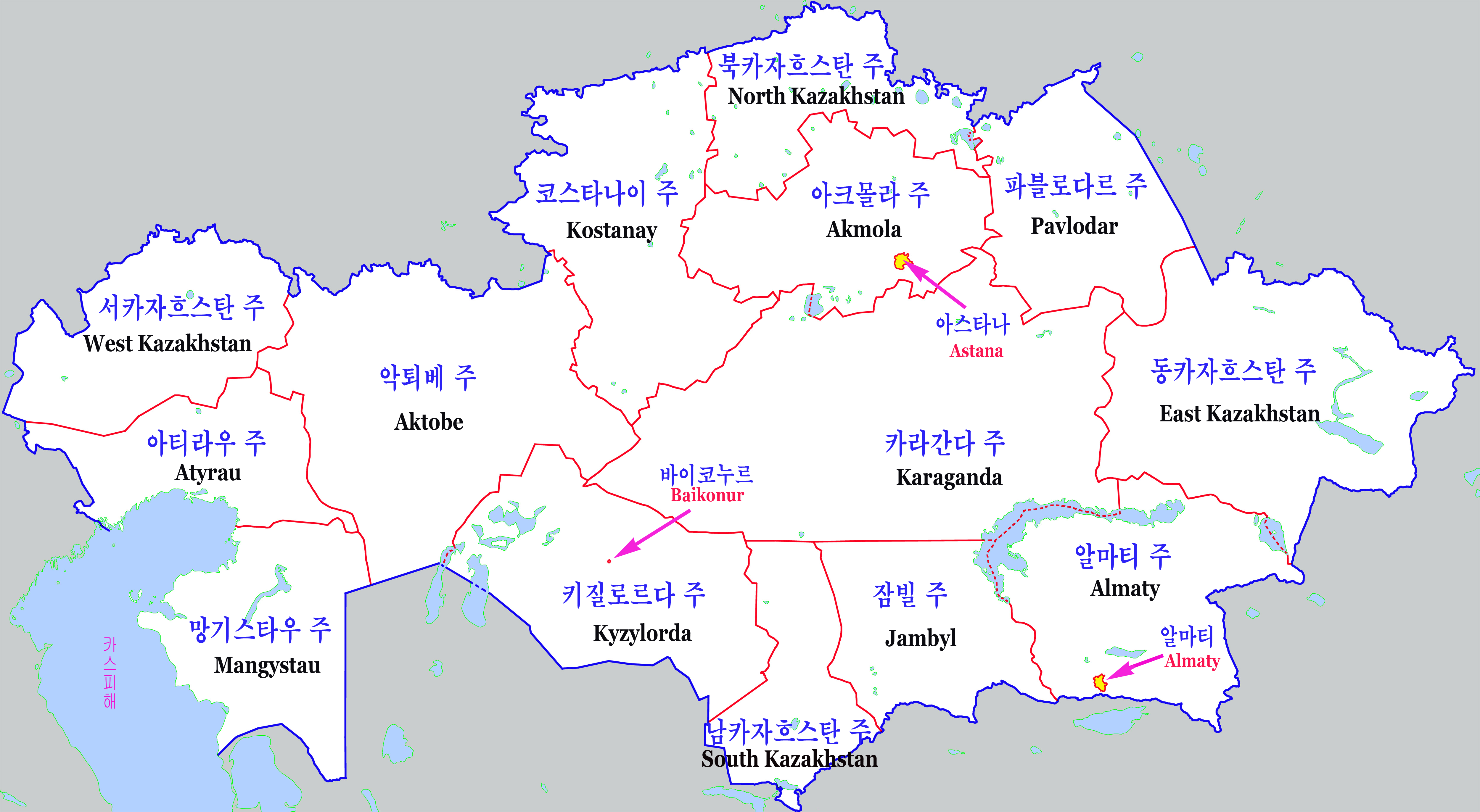 카자흐스탄 행정구역